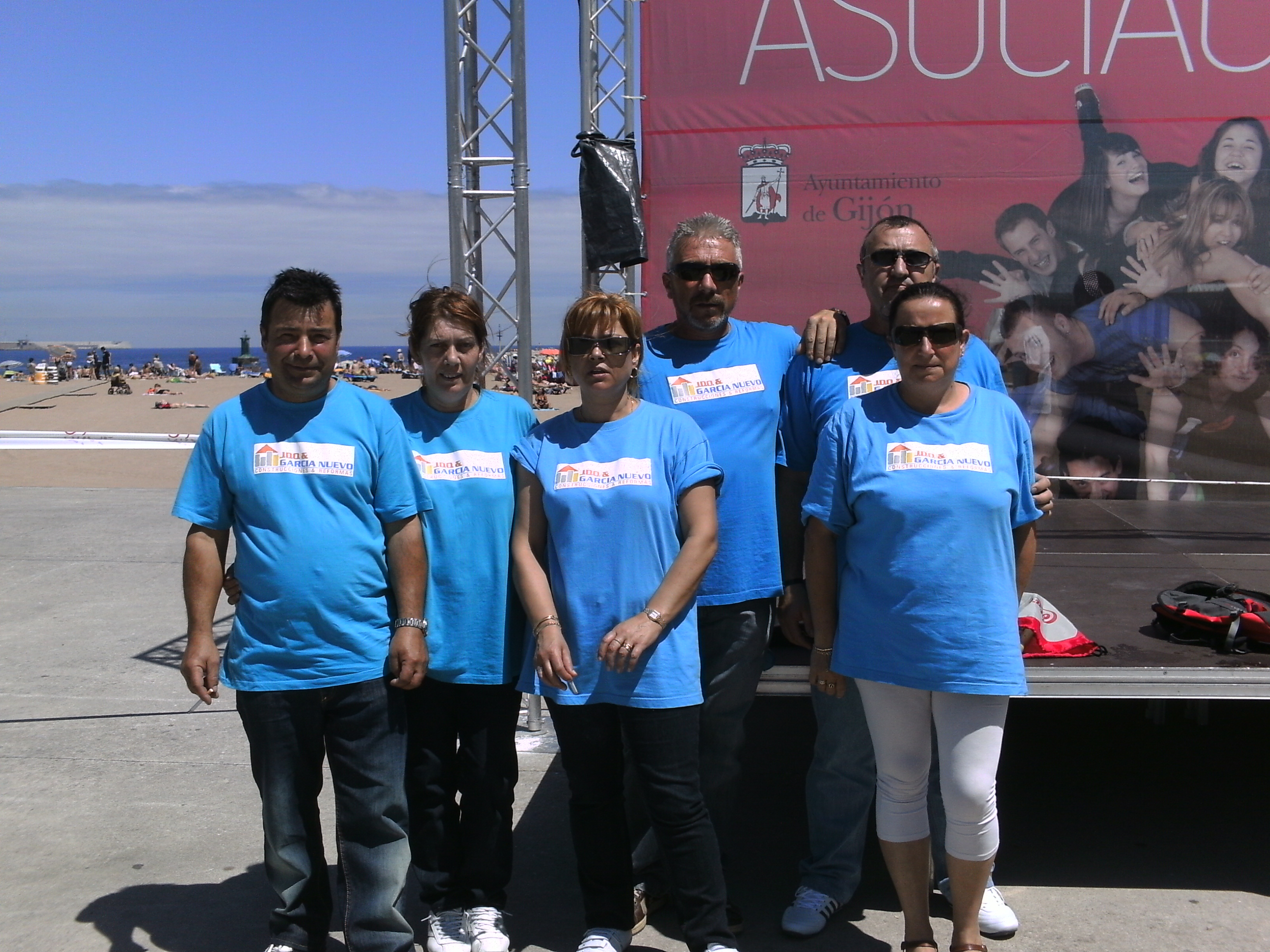 Equipu d'Asturliriu presente nel I Abiertu de la Fiesta de les Asociaciones de Xixón - Fai!. Enrique, Martínez, Marisa, Falo, Javier y Tere. (25-VII-2010)